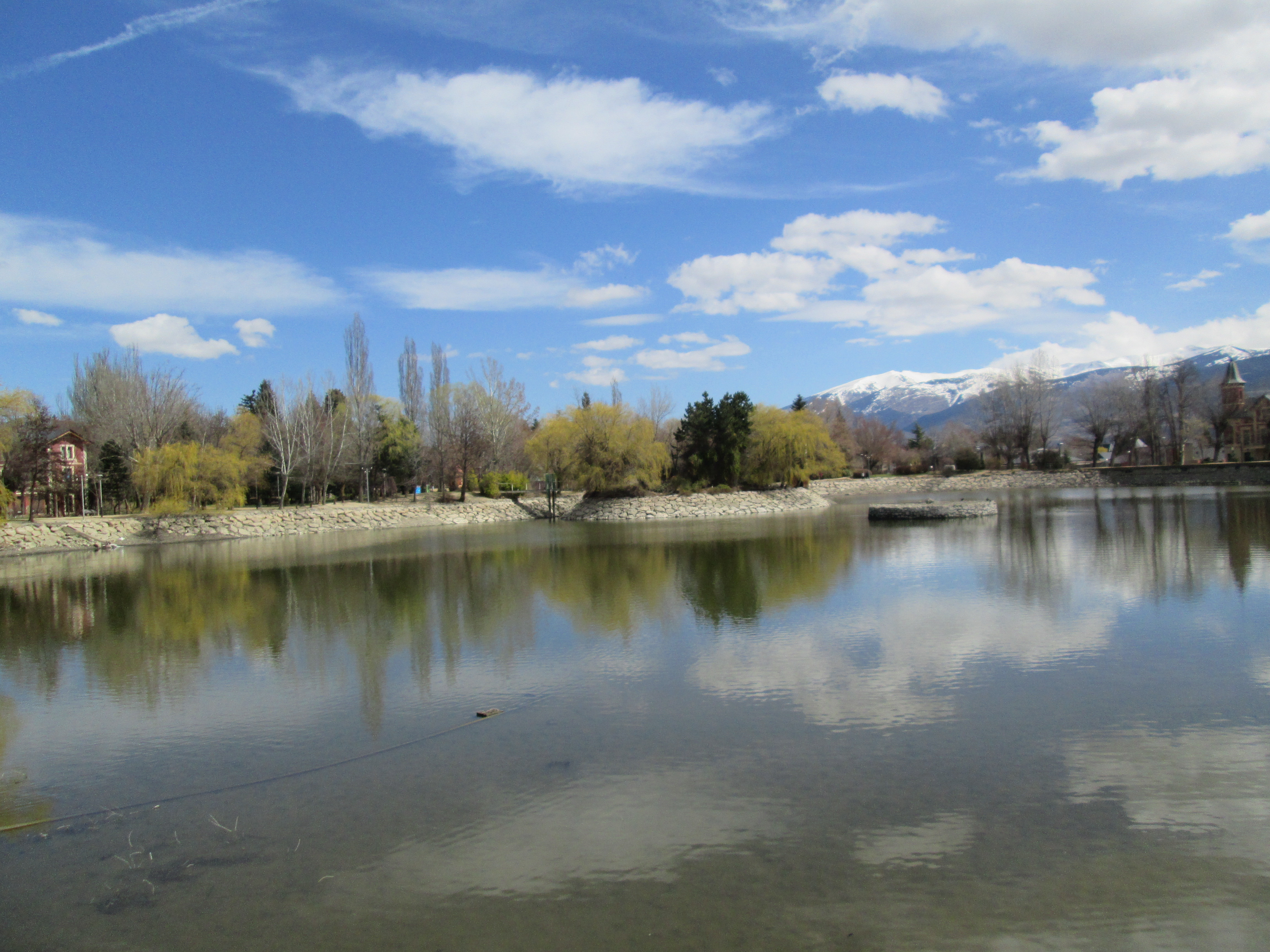 llac març 2014